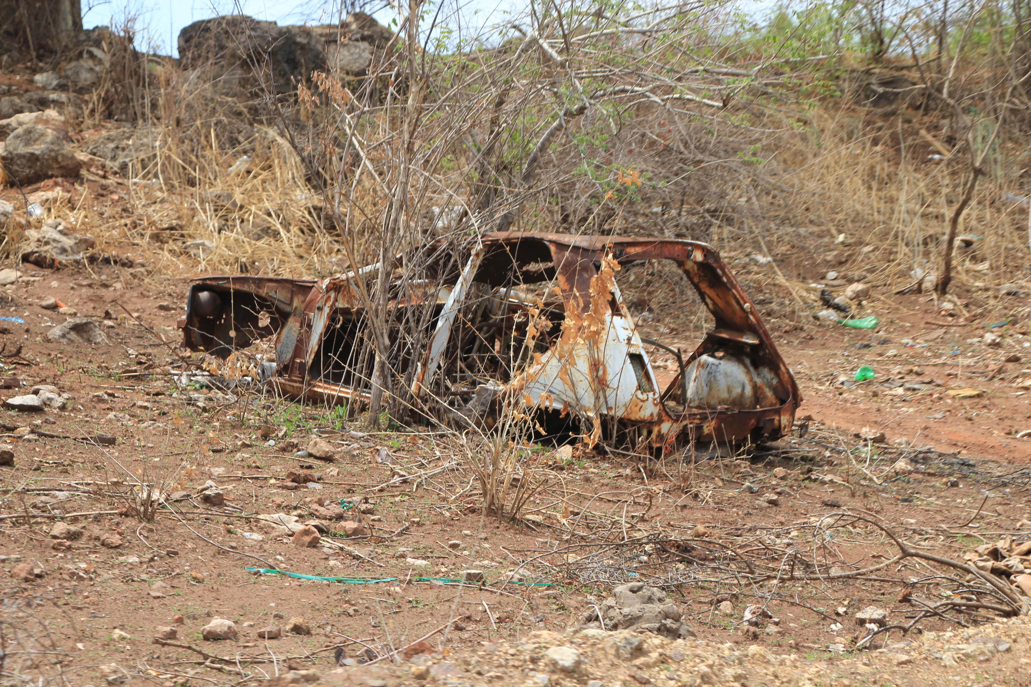 Renault 5 in Kasane, Botswana